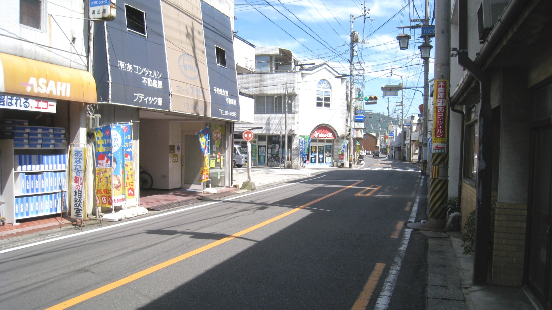 香川県高松市香西地区の目抜き通り、香川県道16号高松王越坂出線の香西バス停付近。